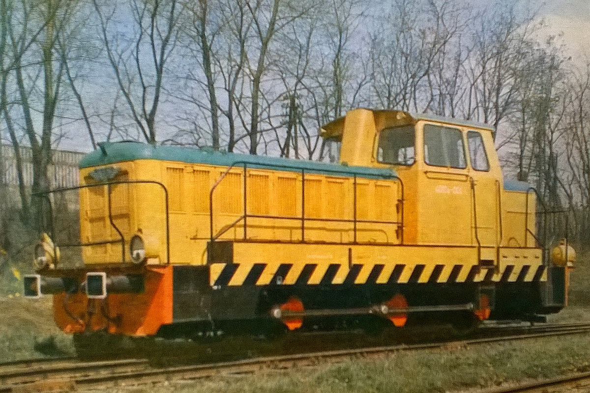 Spalinowa lokomotywa manewrowa 401Da-001 wyprodukowana w 1970 przez Fabrykę Lokomotyw z Chrzanowa dla kolei przemysłowych. Prawdopodobnie fotografia fabryczna.